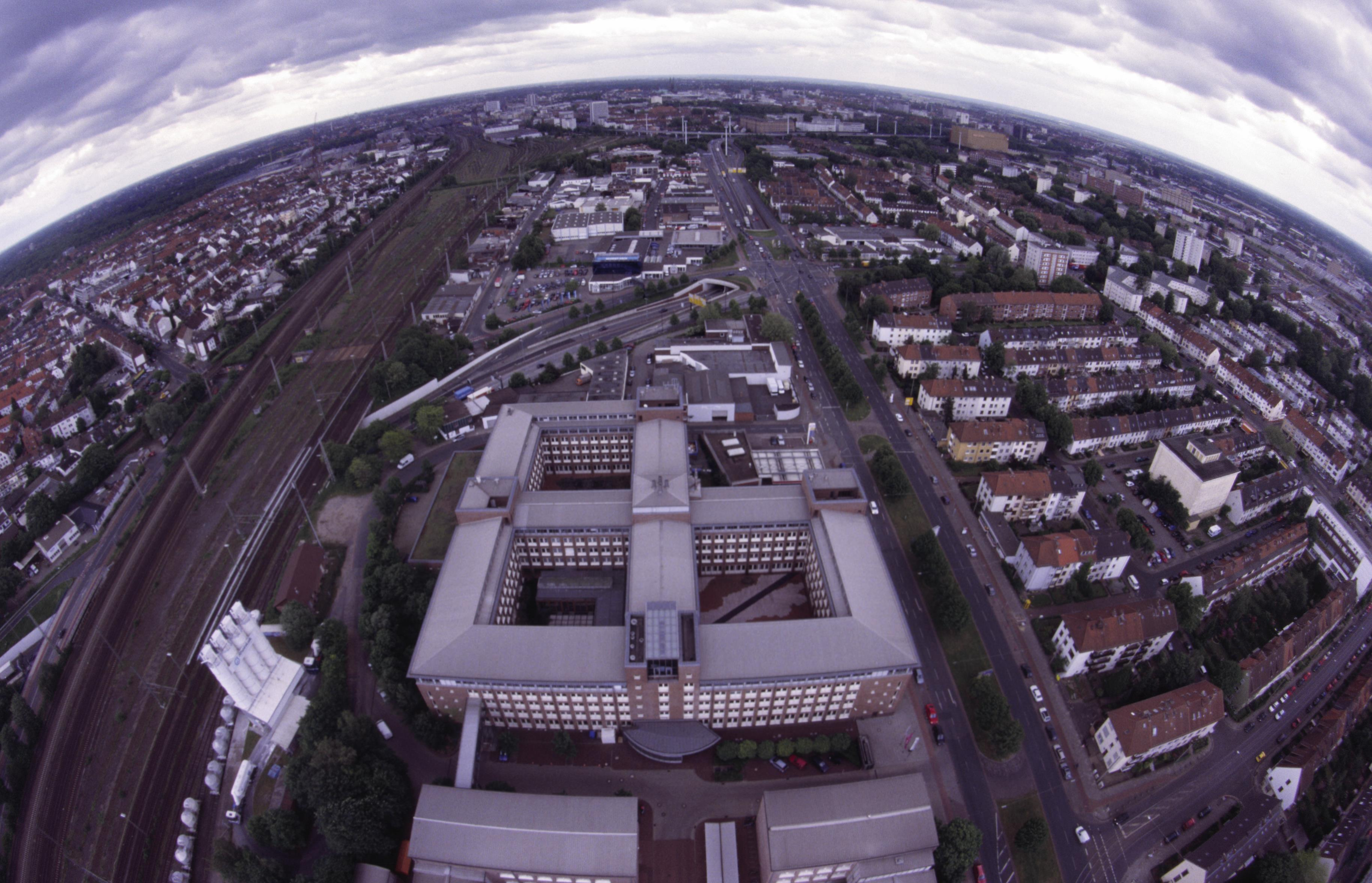 Blick vom Fernmeldeturm Bremen gerade nach unten